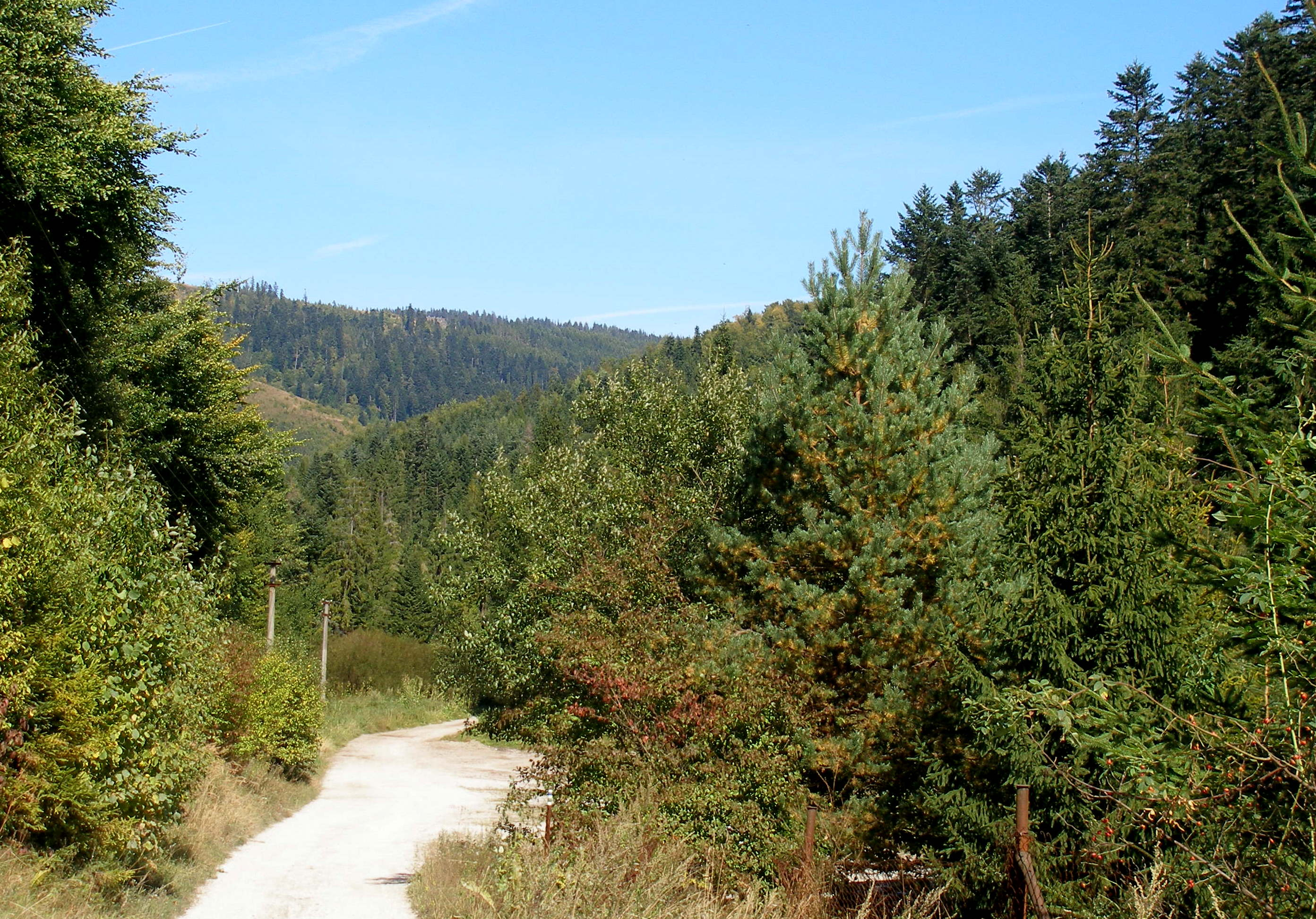 Vrchol cesty pri prechode cez pohorie Branisko